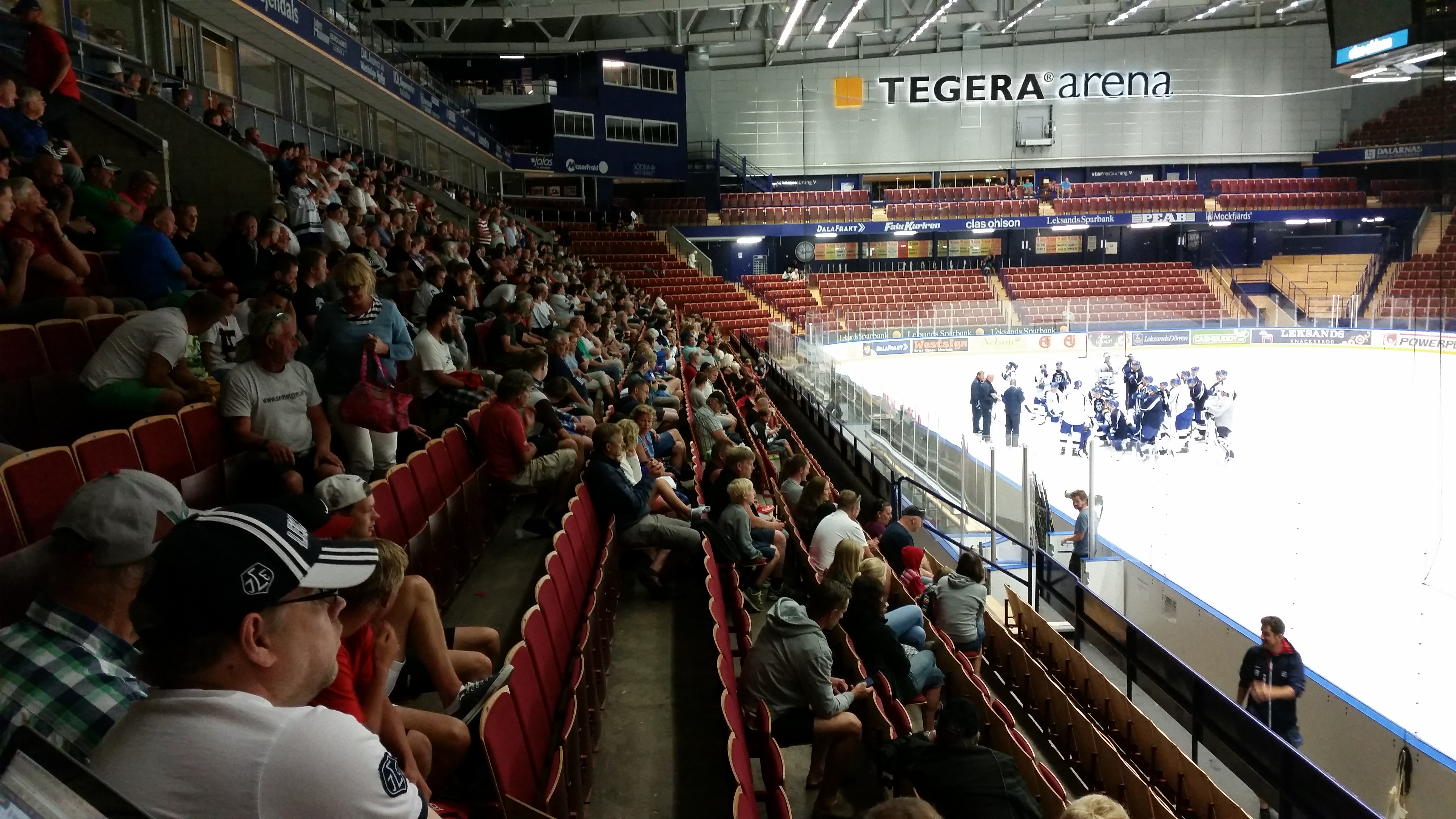 Publik och laget första isträningen säsongen 2014/2015.